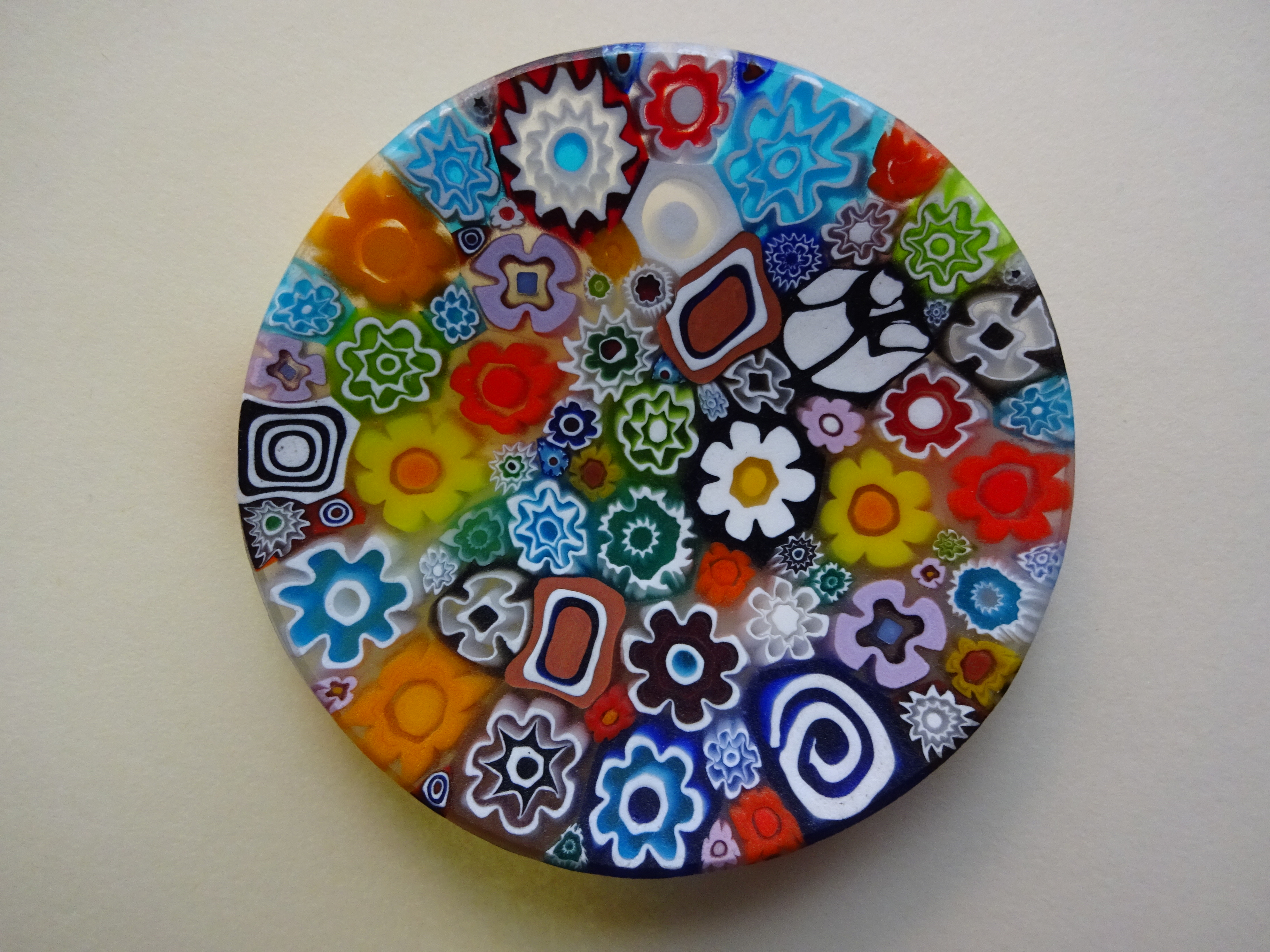 Декоративная розетка в технике миллефиори